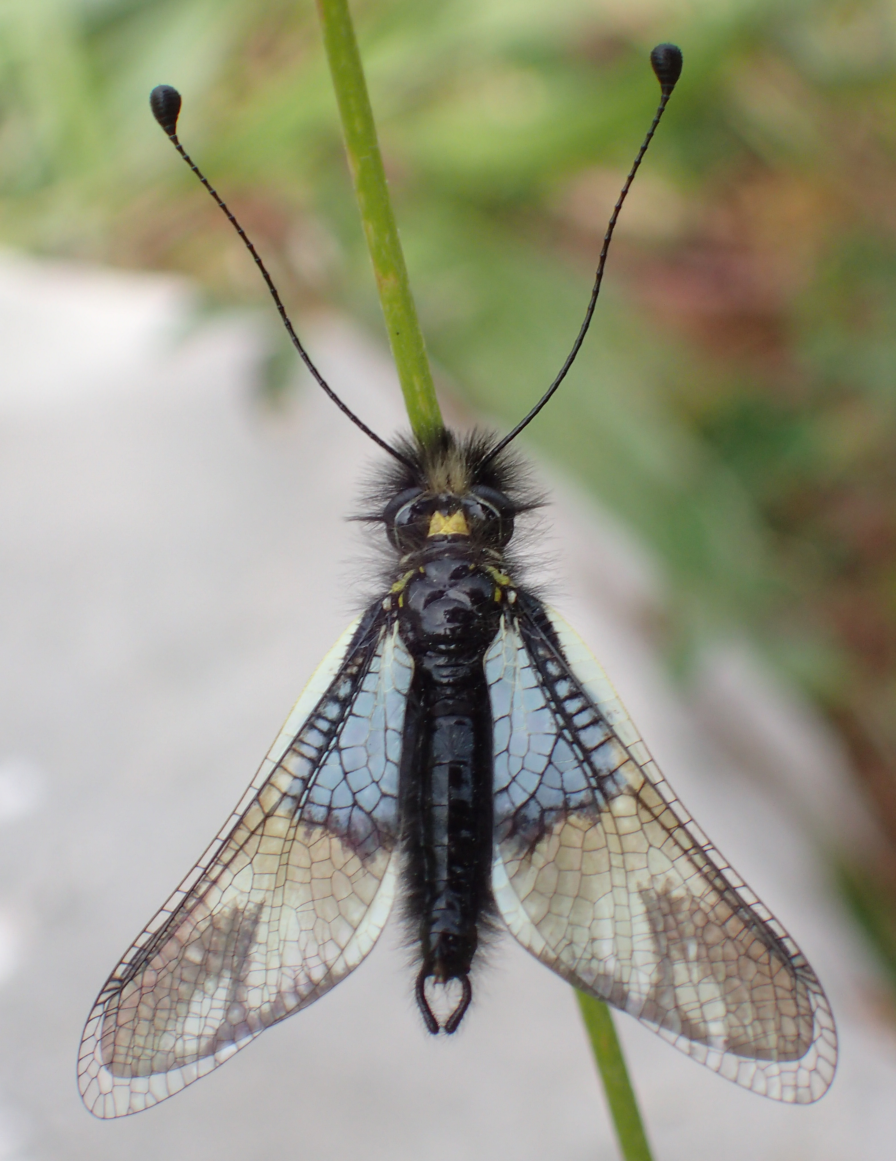 Libelloides lacteus aus Griechenland, Peloponnes, bei Andritsena